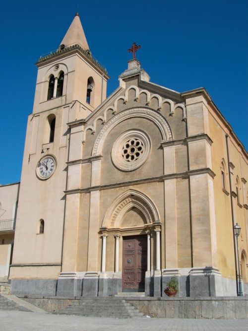 Parrocchia di San Nicolò di Mira a Mezzojuso (PA).